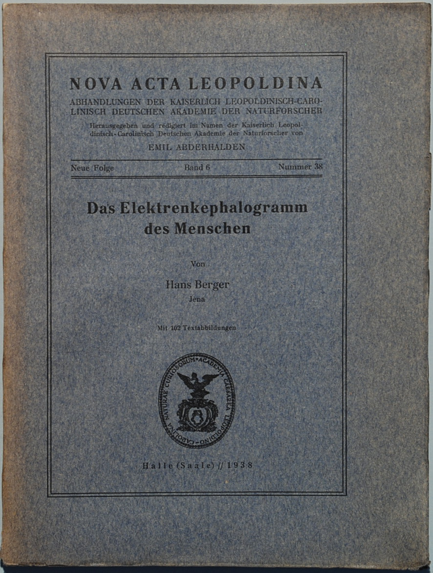 Berger, Hans: Das Elektrenkephalogramm [EEG] des Menschen. Halle/Saale: Acta Leopoldina Bd. 6 (1938), Nr. 38, Seiten 173-309 1.Auflage; Sonderdruck von 136 S. in Orig.-Broschur, unbeschnitten; 26 x 20 cm. Erste Monographie über das EEG von seinem Erfinder